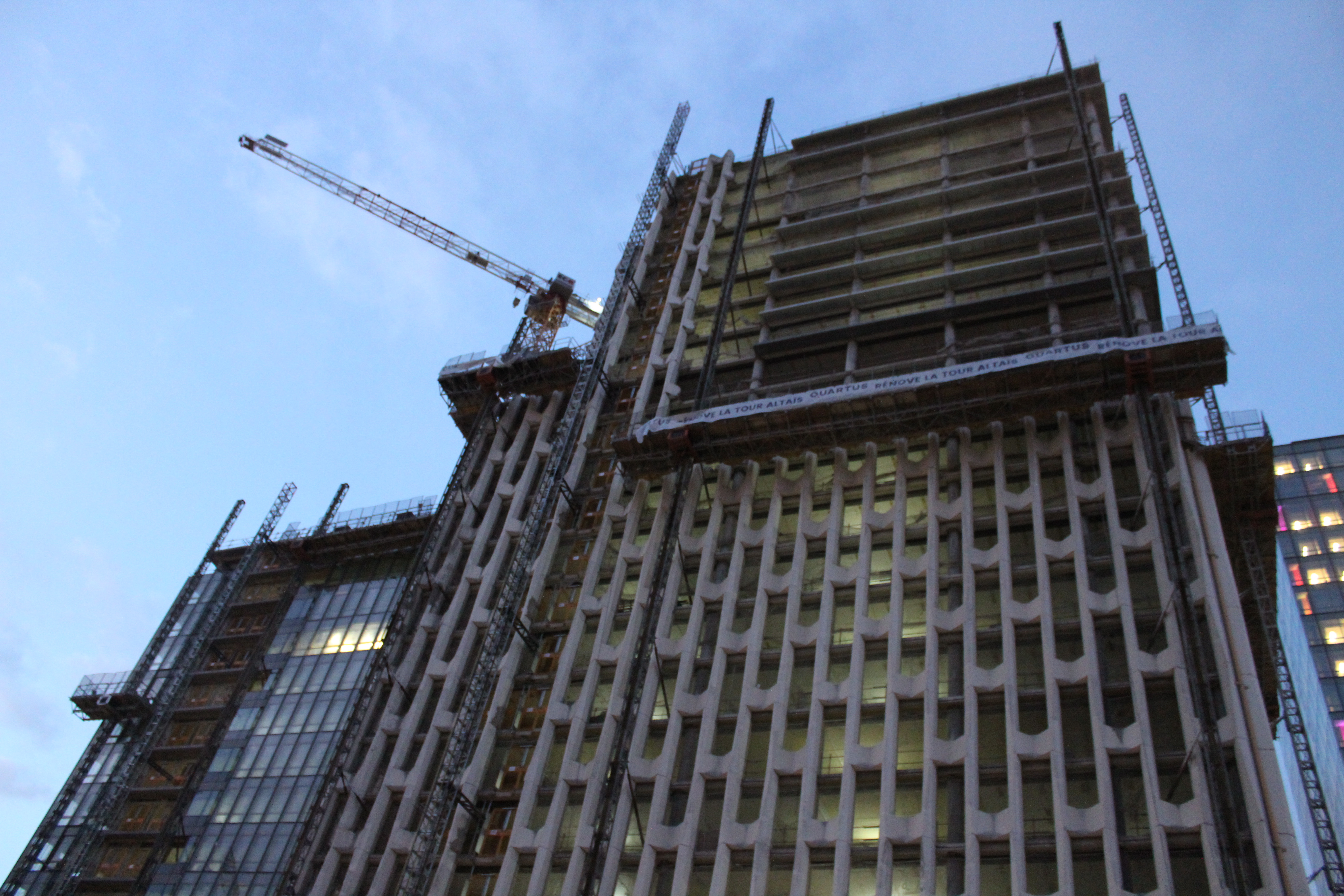 Tour Altaïs Evolution, en phase de réhabilitation (26 janvier 2018)